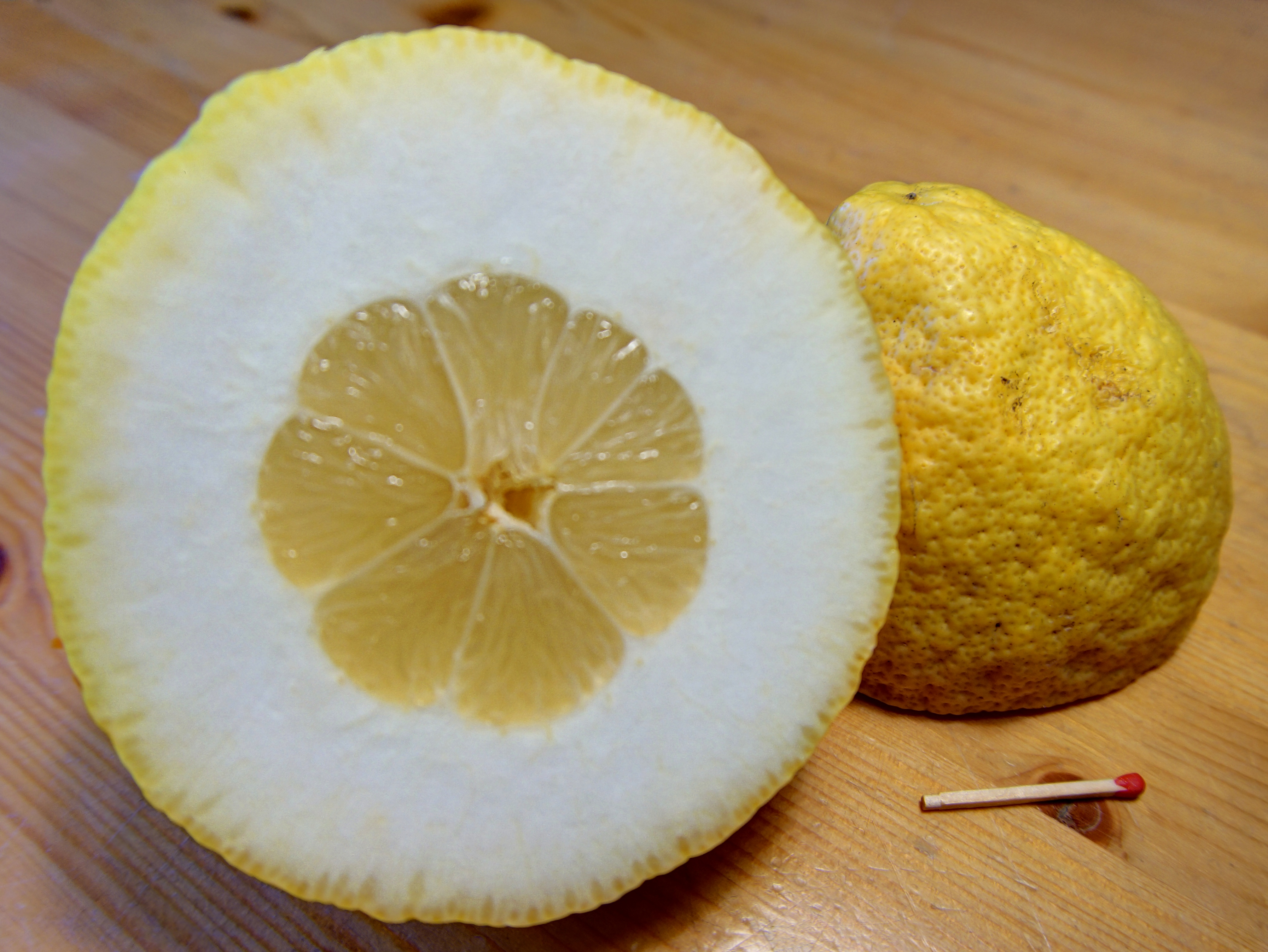 Halbierte Zitronatzitrone (Cedri-Zitrone), Durchmesser an der dicksten Stelle 12 cm